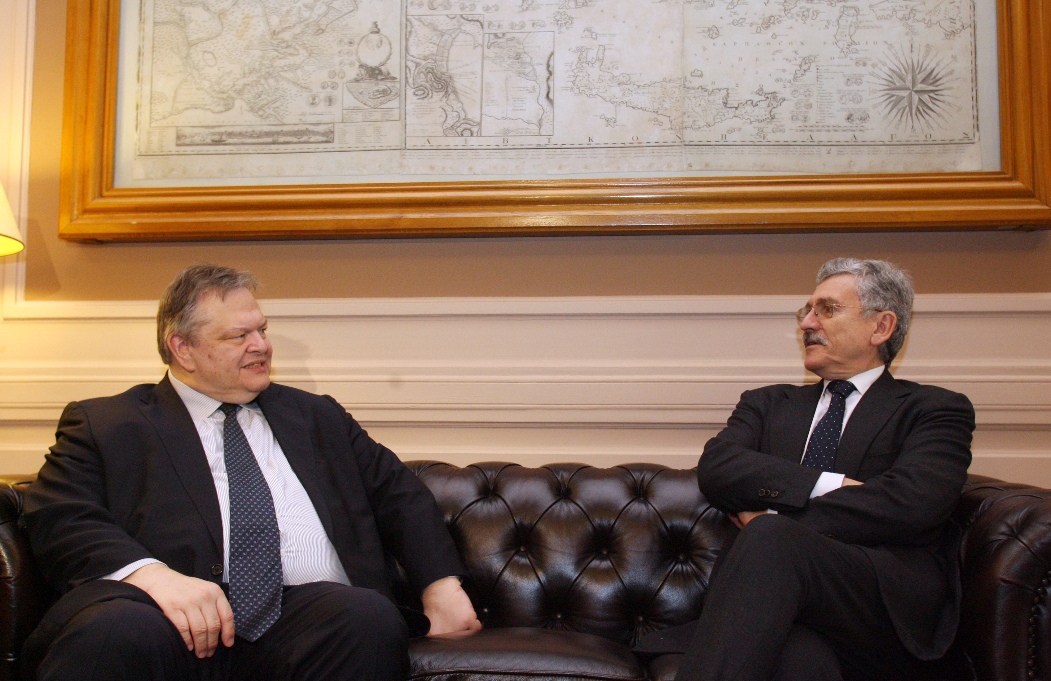 Την Παρασκευή 7 Φεβρουαρίου 2014 ο Αντιπρόεδρος της Κυβέρνησης και ΥΠΕΞ Ευ. Βενιζέλος συναντήθηκε στο Υπουργείο Εξωτερικών με τον πρώην Π/Θ της Ιταλίας Massimo D’Alema. Πηγή: ΕΥΡΩΚΙΝΗΣΗ